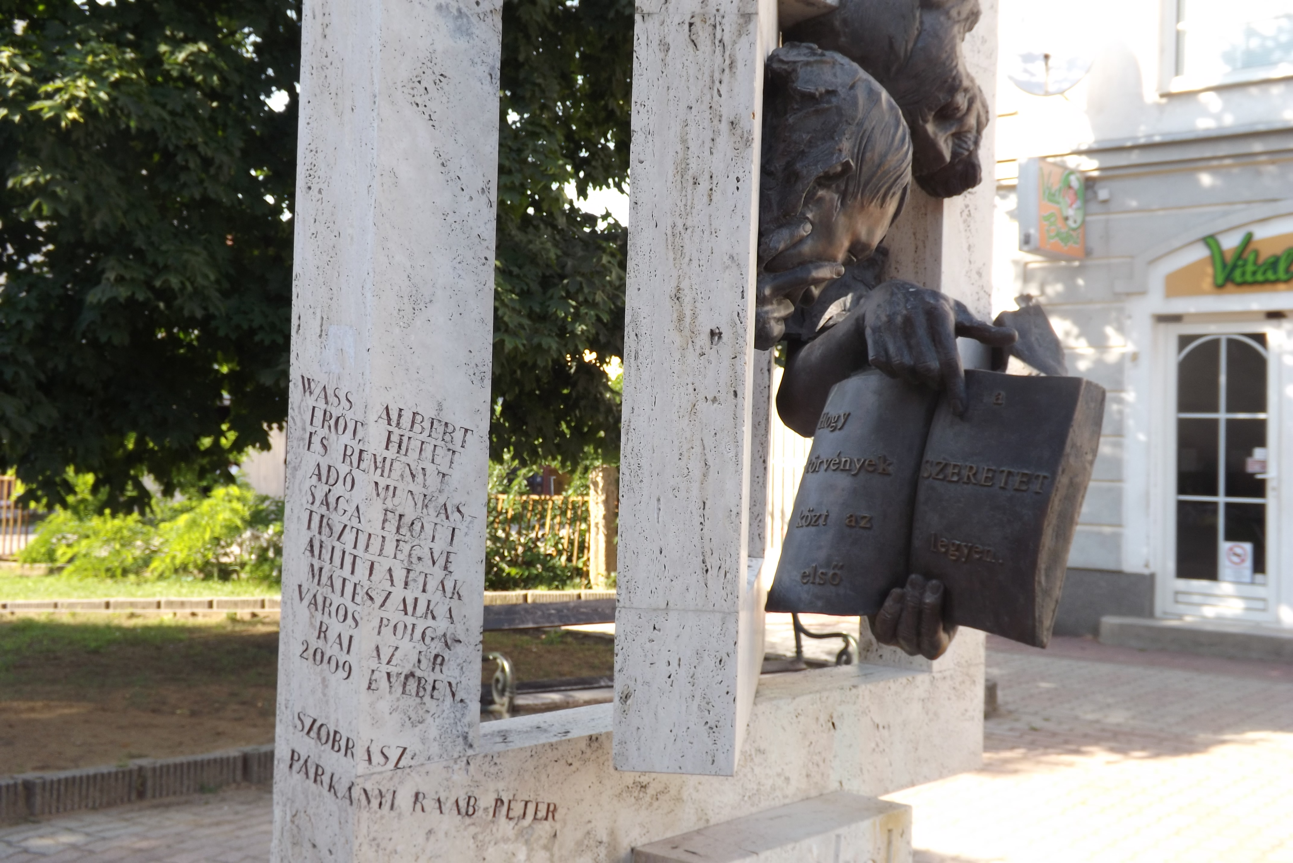 Wass Albert emlékmű, Mátészalka (Párkányi Raab Péter alkotása)